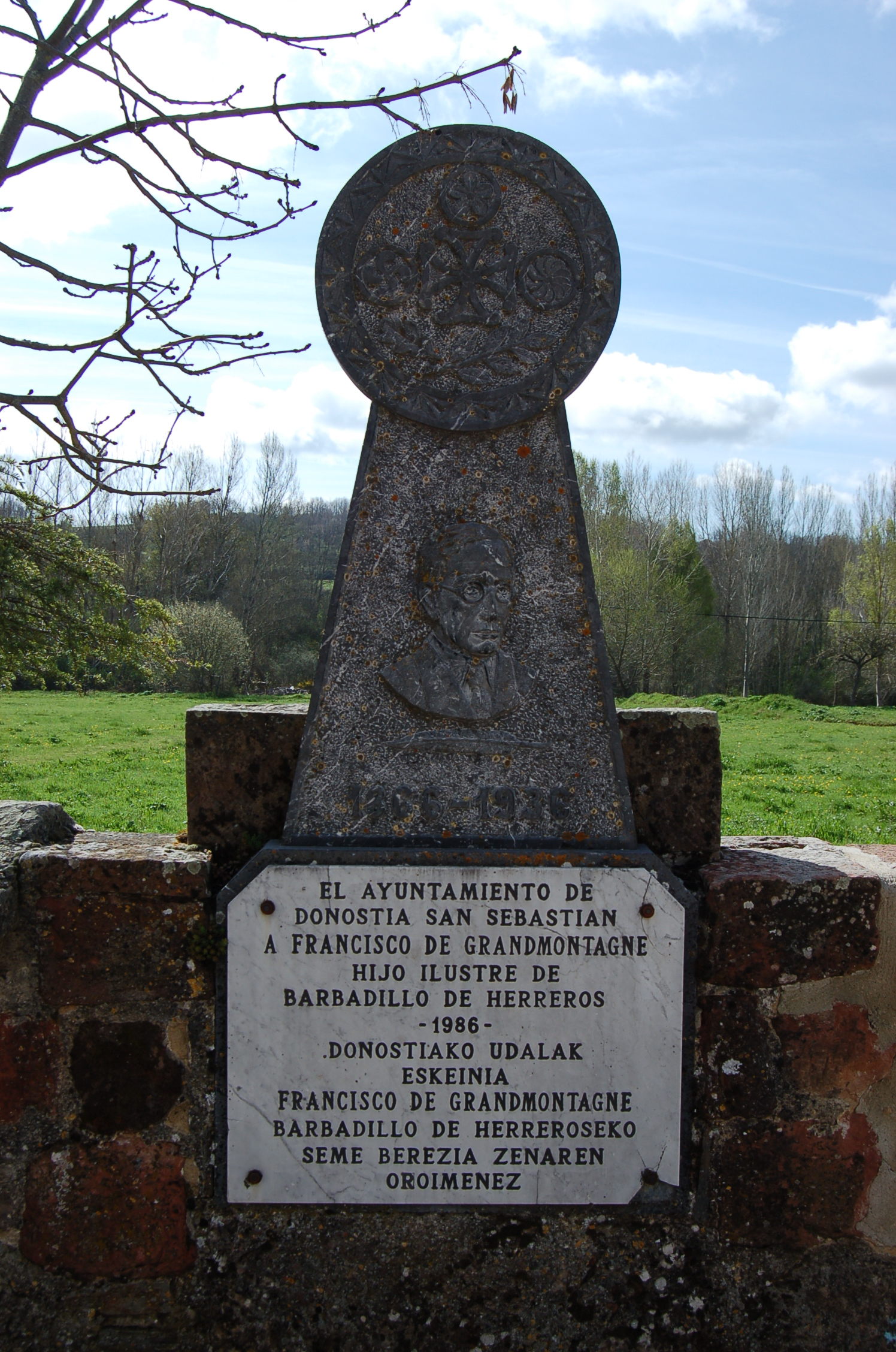 Homenaje a Francisco Grandmontagne en Barbadillo de Herreros